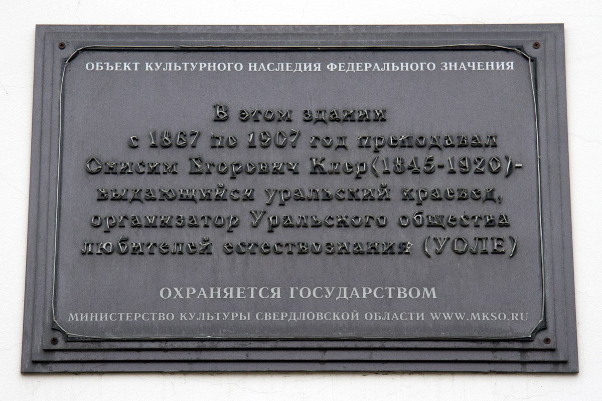 Табличка на фасаде Гимназия № 9, посвященная Клеру О.Е.